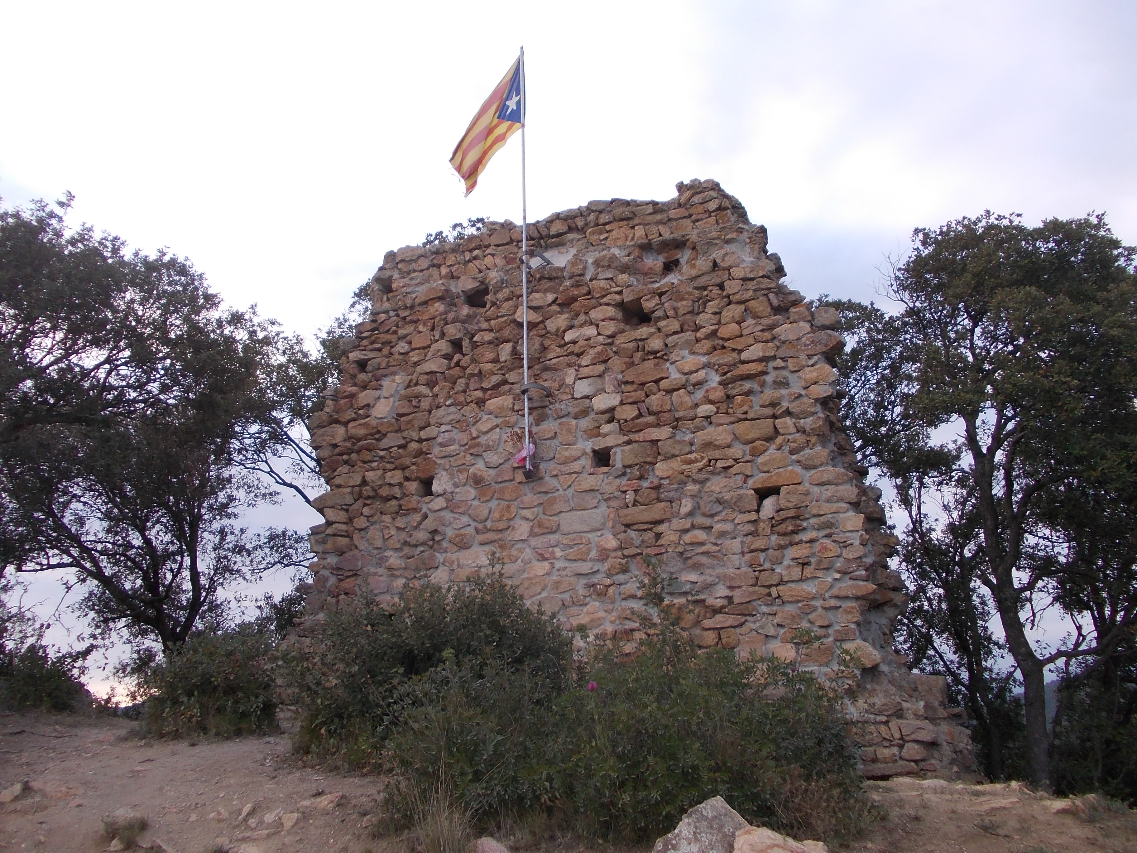 Paret nord de les ruïnes del Castell de Dosrius